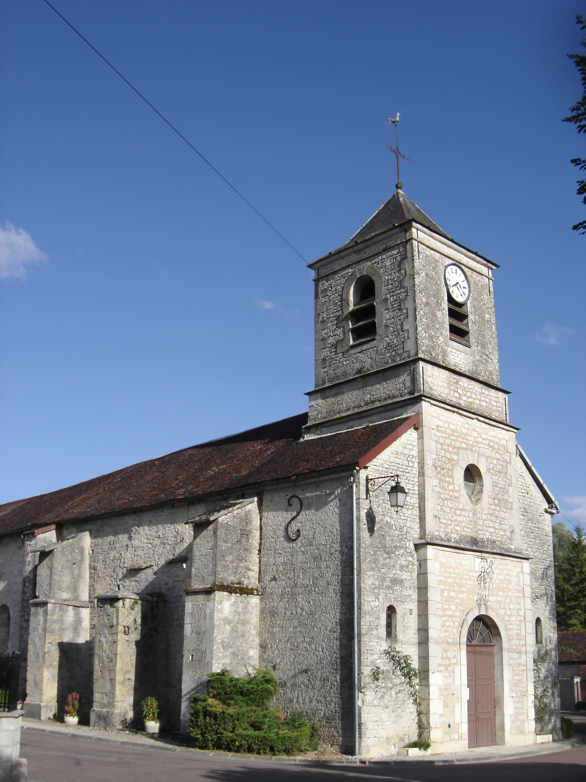 église d'Eguilly sous Bois - Aube - France